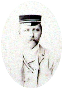 Porträt von Michael Haubtmann (* 1843, + 1921)